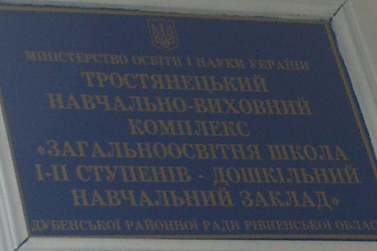 с.Тростянець (табличка на школі)